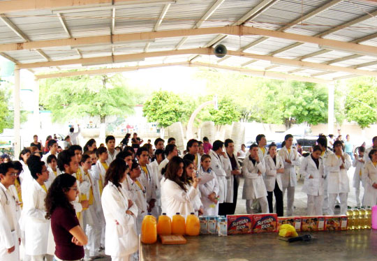 Periodismo 30